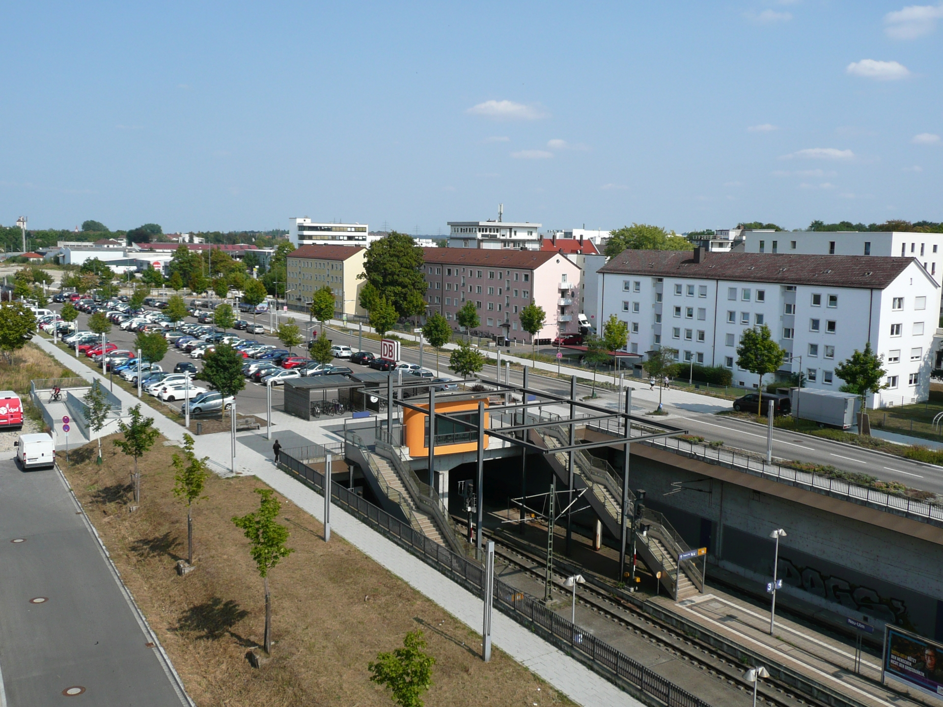 Park&Ride über dem östlichen Trog